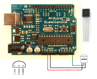 Schema di un sensore LM35DZ collegato ad Arduino